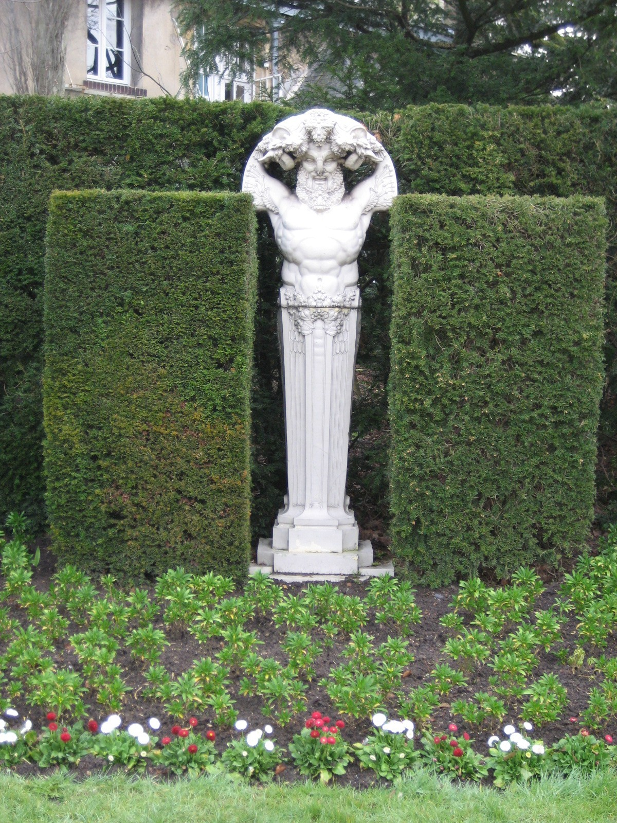 Statue de Pan au Jardin des plantes de Rouen. Photo personnelle prise par F. Etiemble